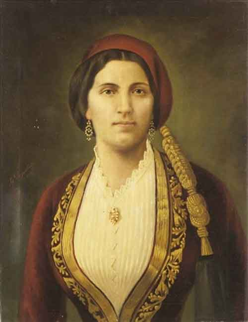 Portrait of Kalidona Trikoupis